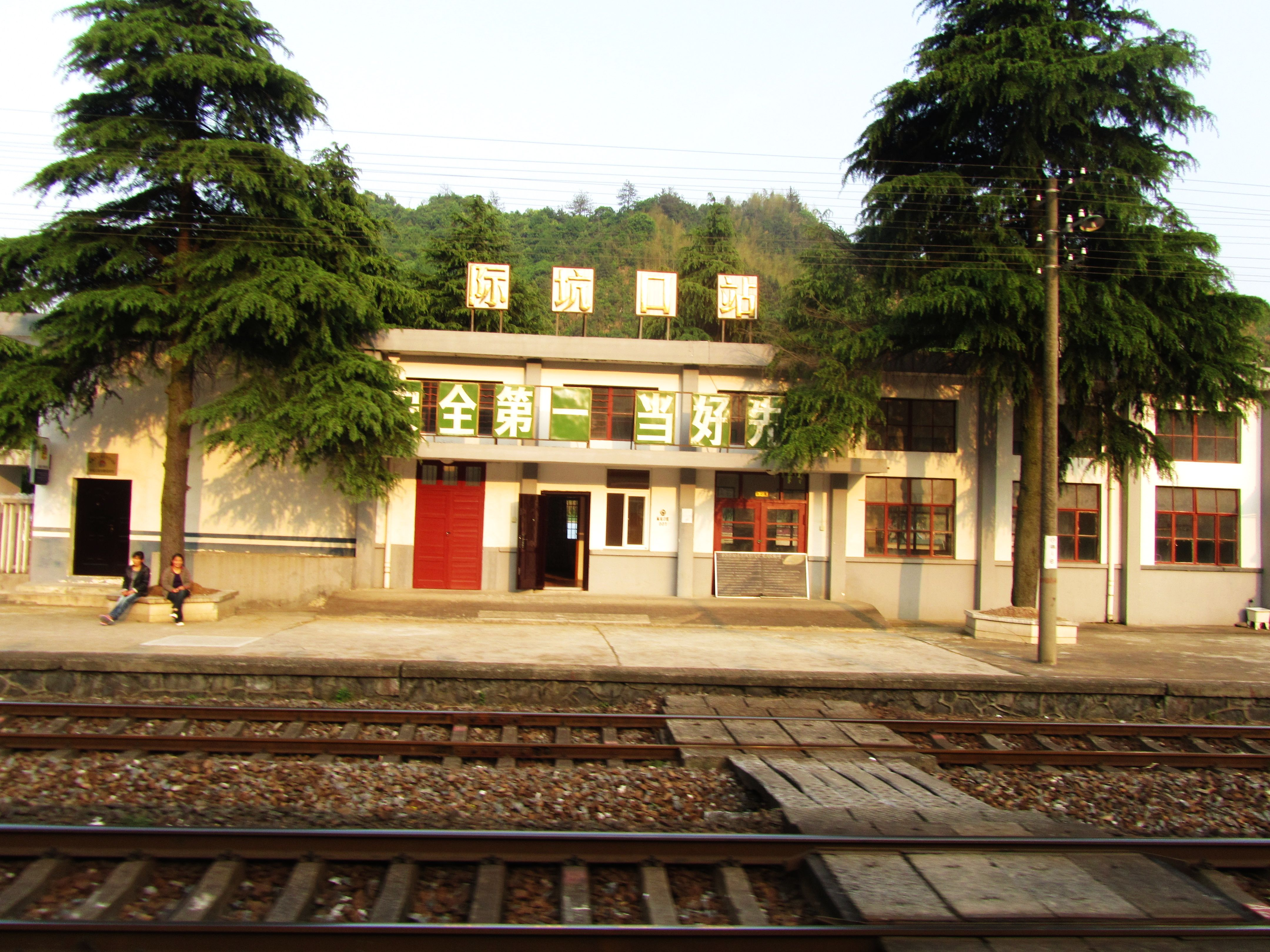 皖赣铁路际坑口站，位于宣城市绩溪县。